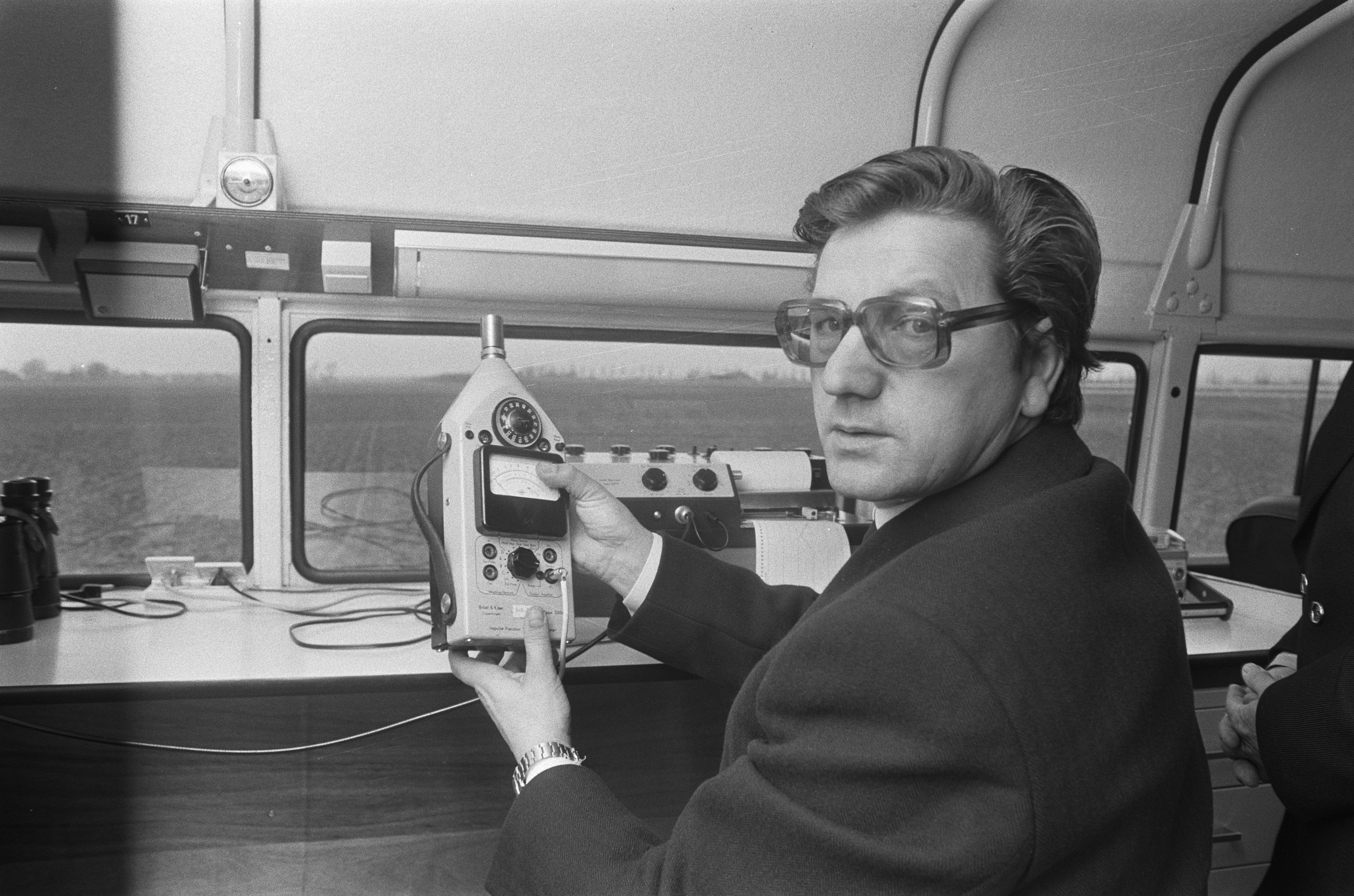 Collectie / Archief : Fotocollectie Anefo Reportage / Serie : [ onbekend ] Beschrijving : Minister Westerterp stelt geluidsmeetauto op startbaan bij Schiphol in gebruik Datum : 20 maart 1974 Locatie : Noord-Holland, Schiphol Trefwoorden : ministers, politiek Persoonsnaam : Westerterp, Tjerk Fotograaf : Peters, Hans / Anefo Auteursrechthebbende : Nationaal Archief Materiaalsoort : Negatief (zwart/wit) Nummer archiefinventaris : bekijk toegang 2.24.01.05 Bestanddeelnummer : 927-0778